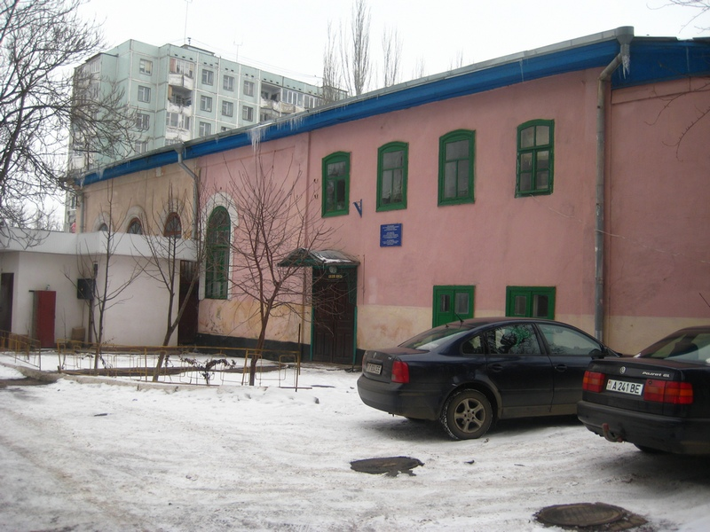 Здание бывшей хабадской синагоги «Садигурер Клойз»